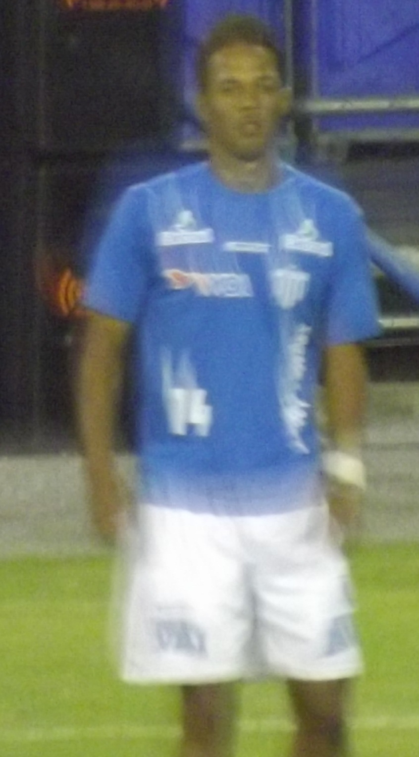 Bruno atuando pelo Avaí.